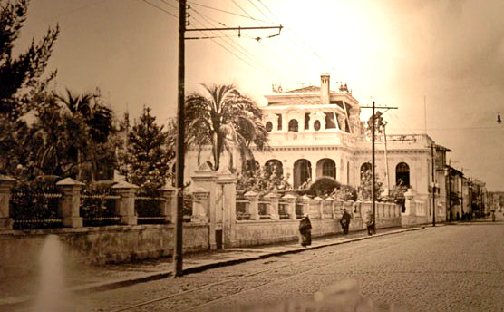 Fachada noroccidental y jardines del Palacio de Najas, actual sede de la Cancillería de Ecuador, en la ciudad de Quito (1930).